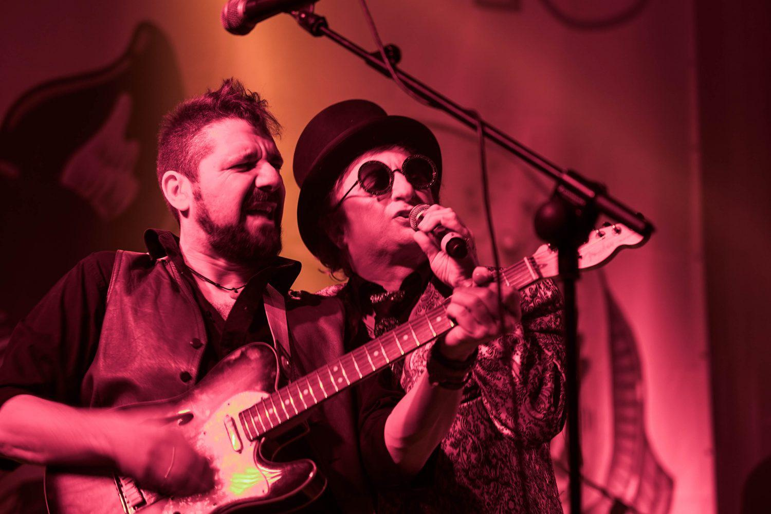 El parque de Berlín se convirtió ayer sábado, 2 de marzo, en una gran pista de baile donde madrileños y madrileñas de todas las edades acudieron ataviados con sus disfraces y máscaras para disfrutar de estas fiestas donde por un momento cada uno puede dejar de ser él mismo para ponerse en la piel de otro personaje. Entre los asistentes, los niños, niñas, padres y madres que fabricaron su propio disfraz en los talleres creativos que se organizaron a tal efecto días antes de las fiestas y que corrieron a cargo de artistas y diseñadores.